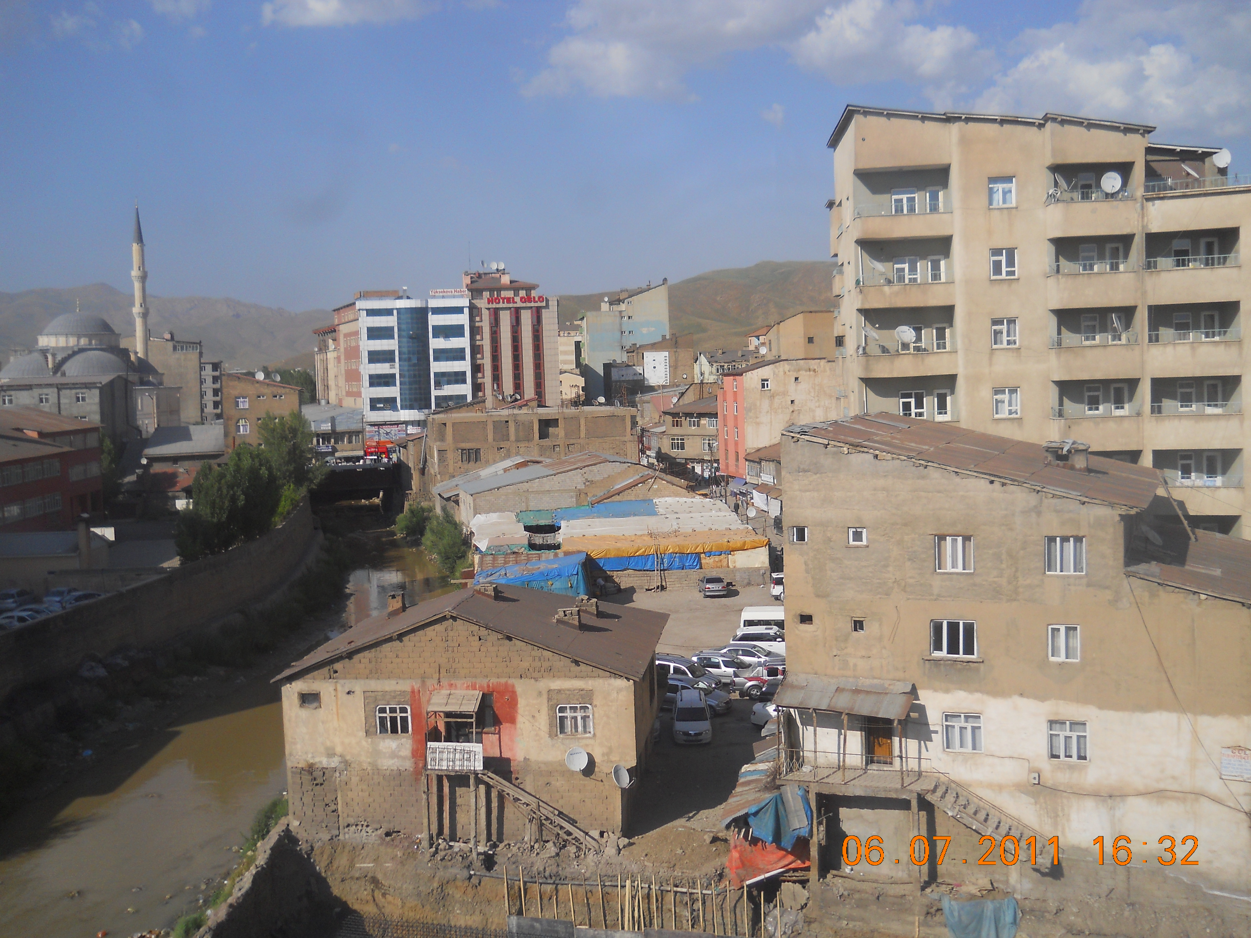 Yüksekova